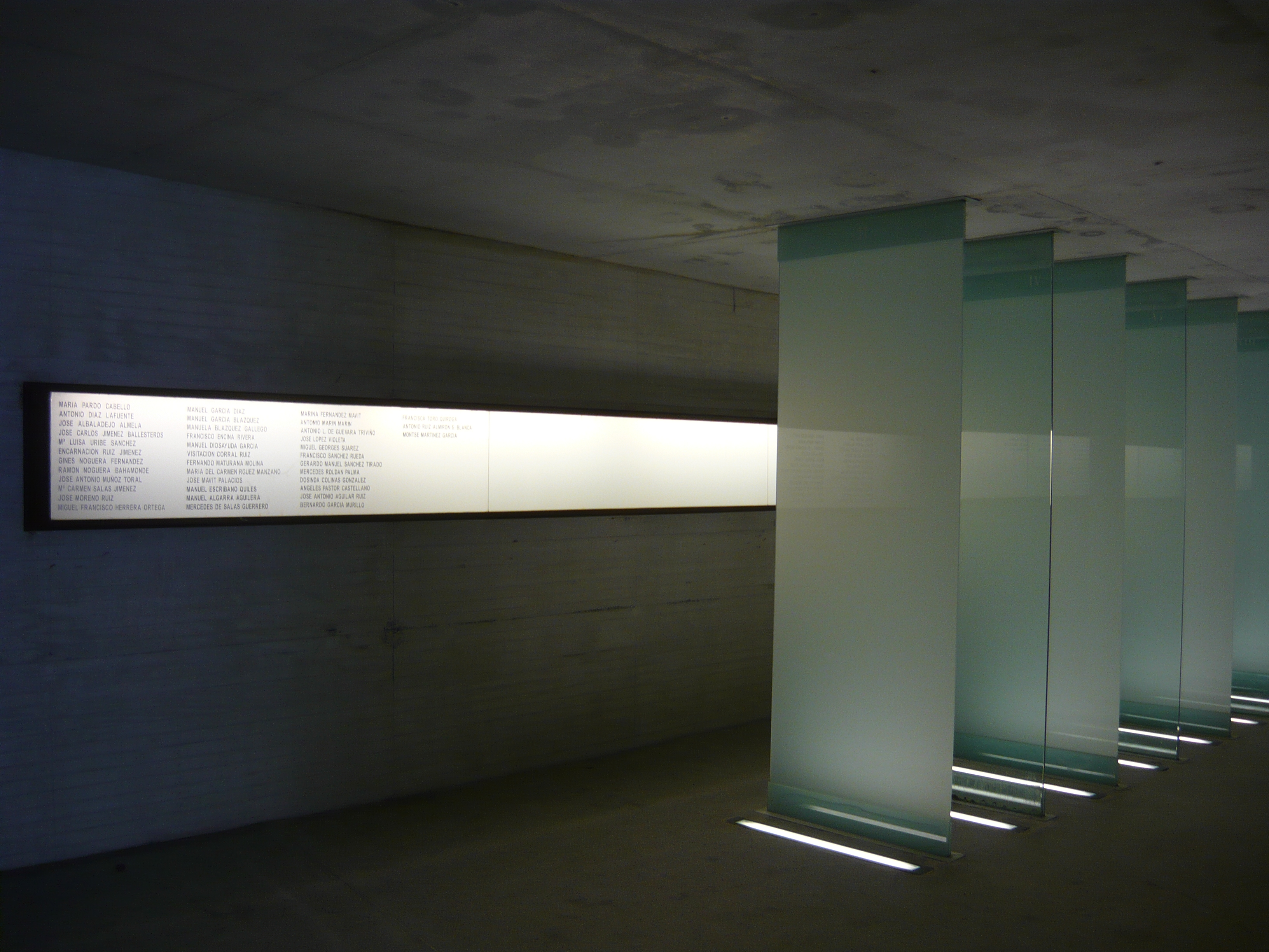 Espacio Memoria de Granada, bajo el jardín del patio de San Juan del Cementerio de Granada (España).